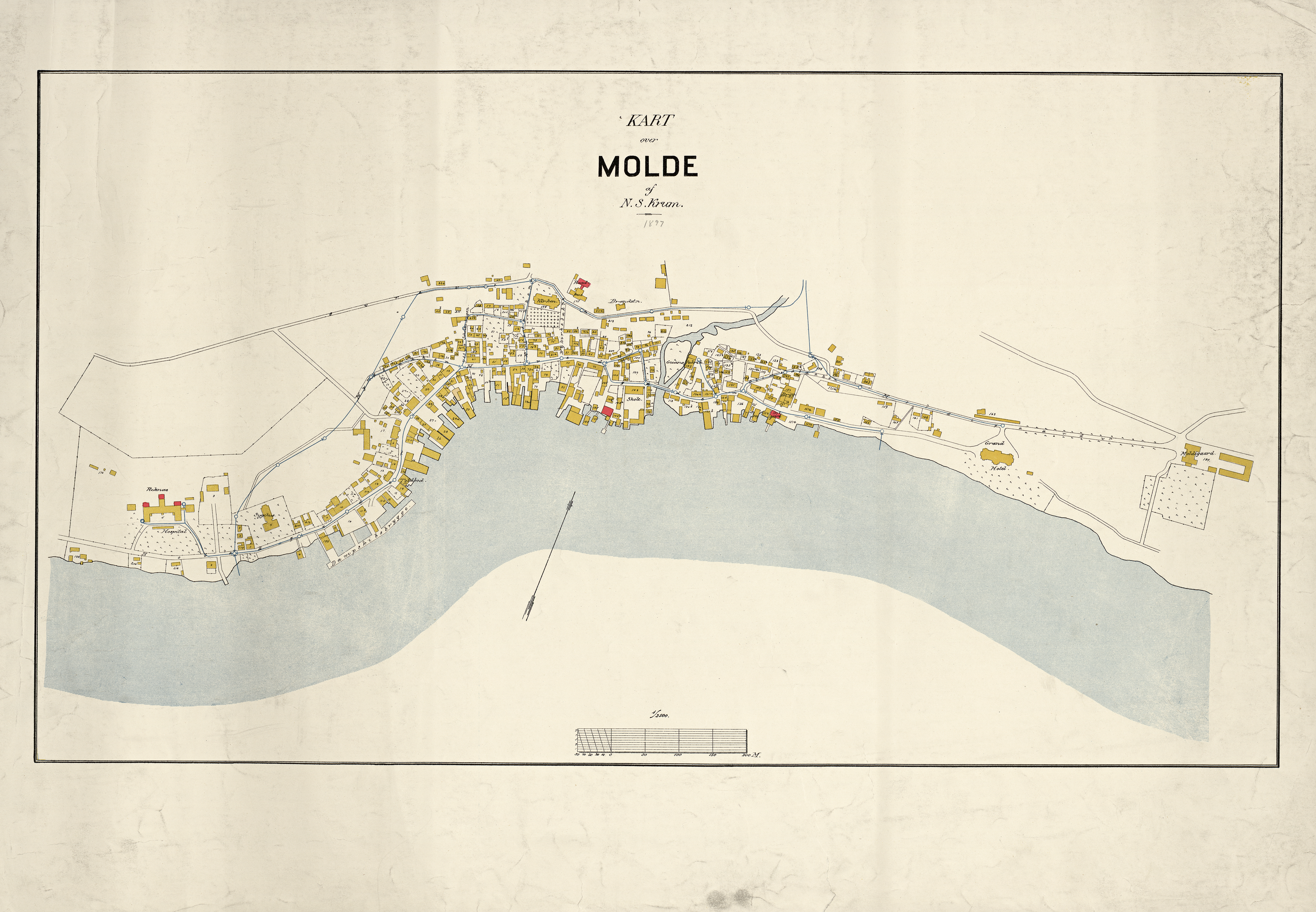 Kart over Molde [1897]